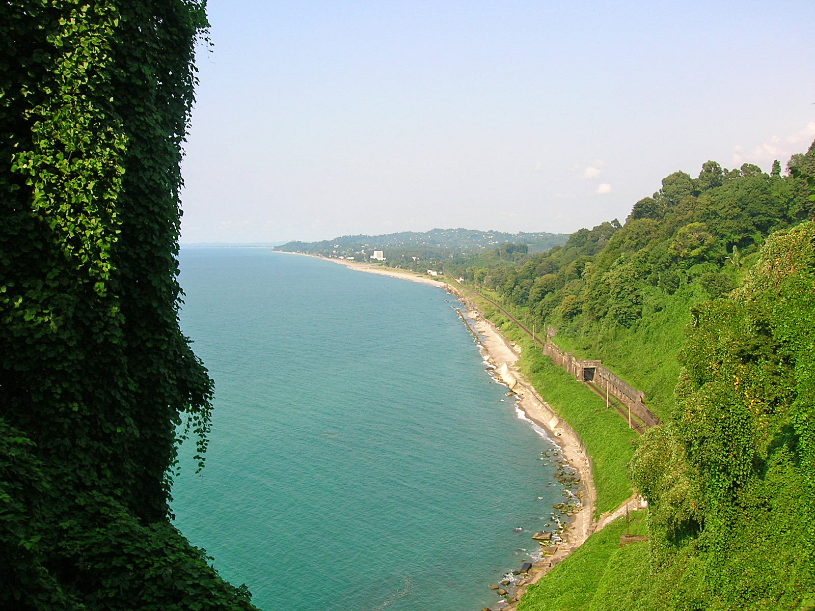 შავი ზღვა ბათუმის ბოტანიკური ბაღიდან. 2006